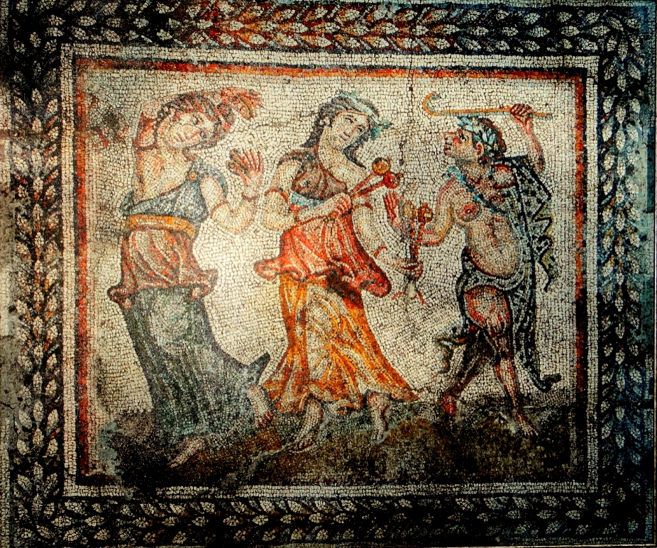 “Dionysus's Procession”, The Unique 4th century AD Ancient Roman mosaic in the city of Augusta Trayana in Bulgaria's Stara Zagora